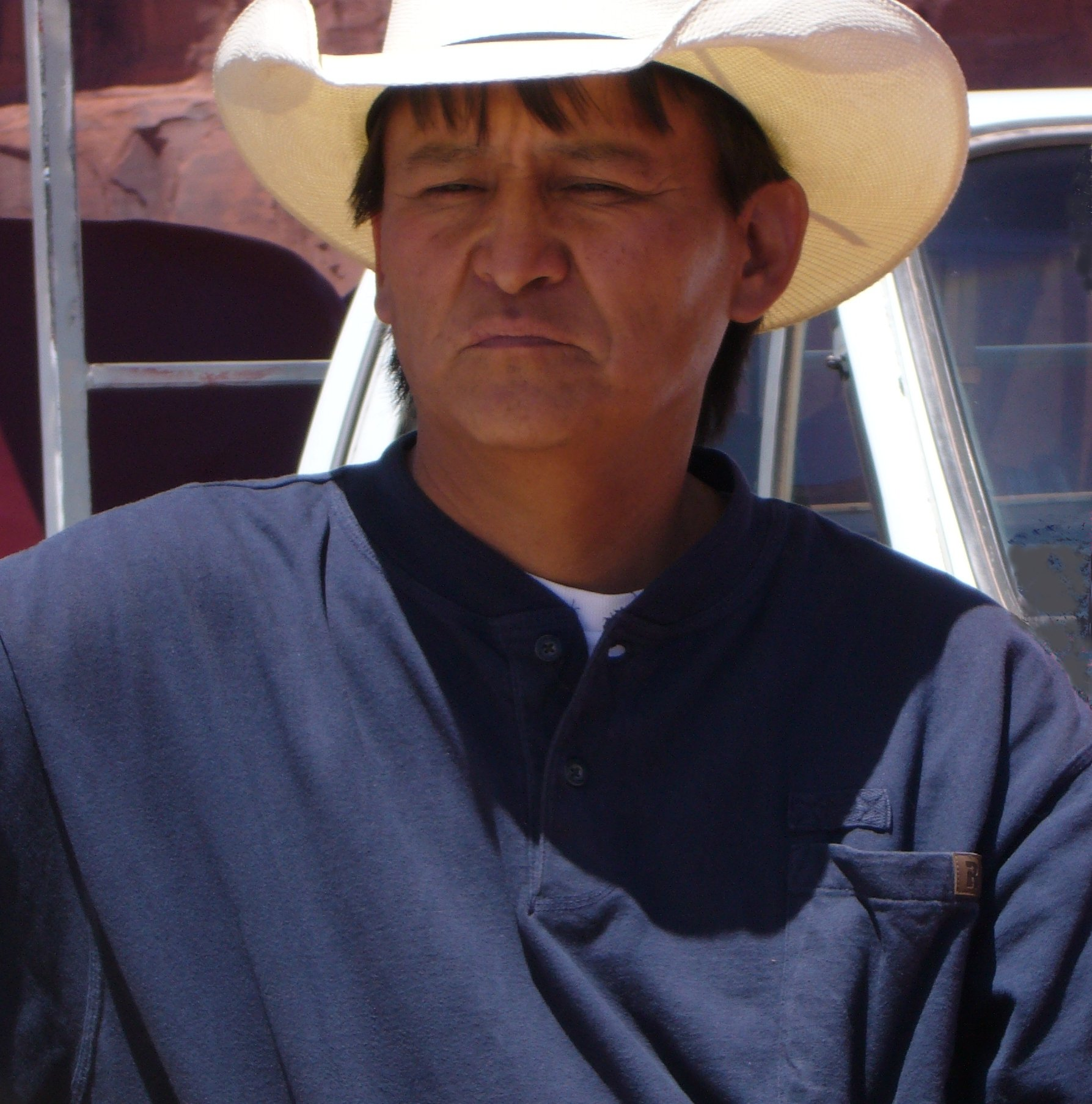 Navajo guide for tourists in Monument Valley, Arizona photo et diffusion avec accord de la personne1